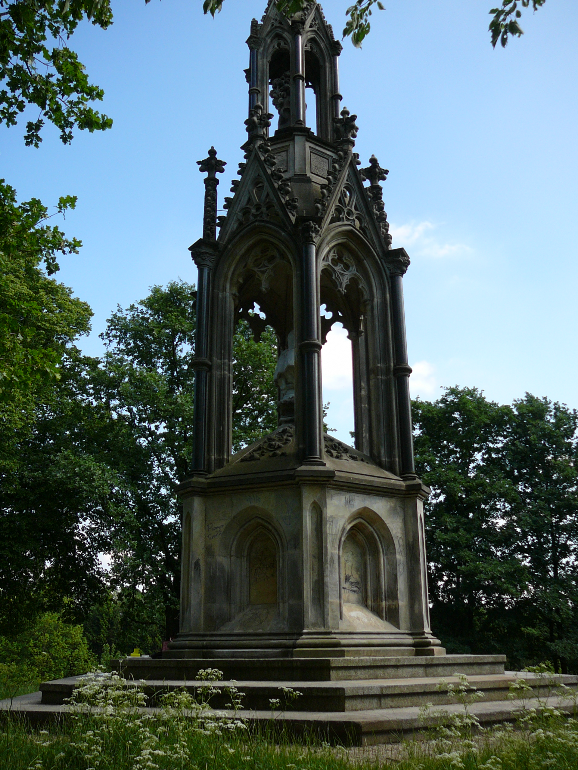 Kaiser Wilhelm-Denkmal (Wilhelm I.) in Wülfrath an der Grenze zu Wuppertal, Nähe Aprather Schloss